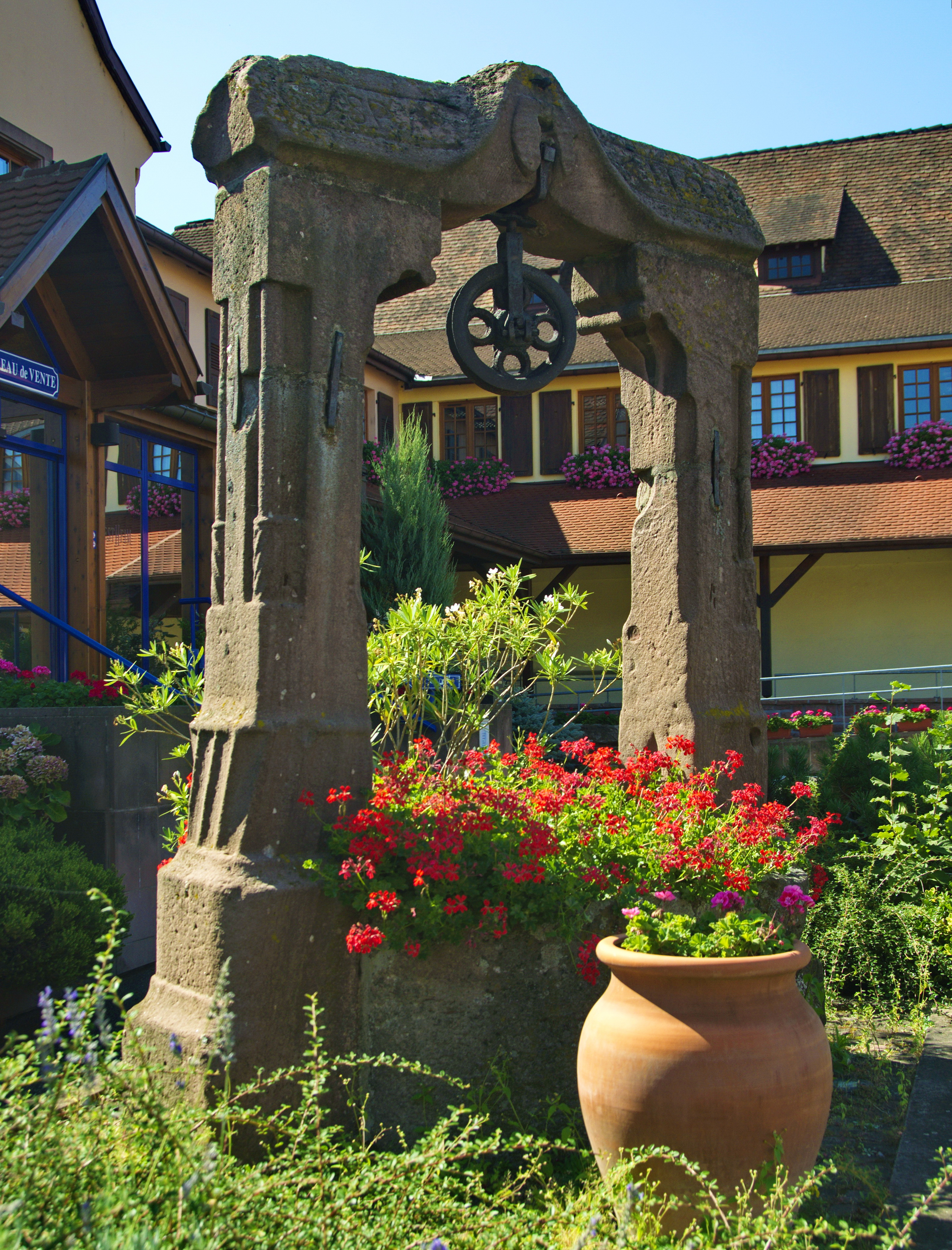 Puits, 3 rue du Général-de-Gaulle (Inscrit, 1932) .